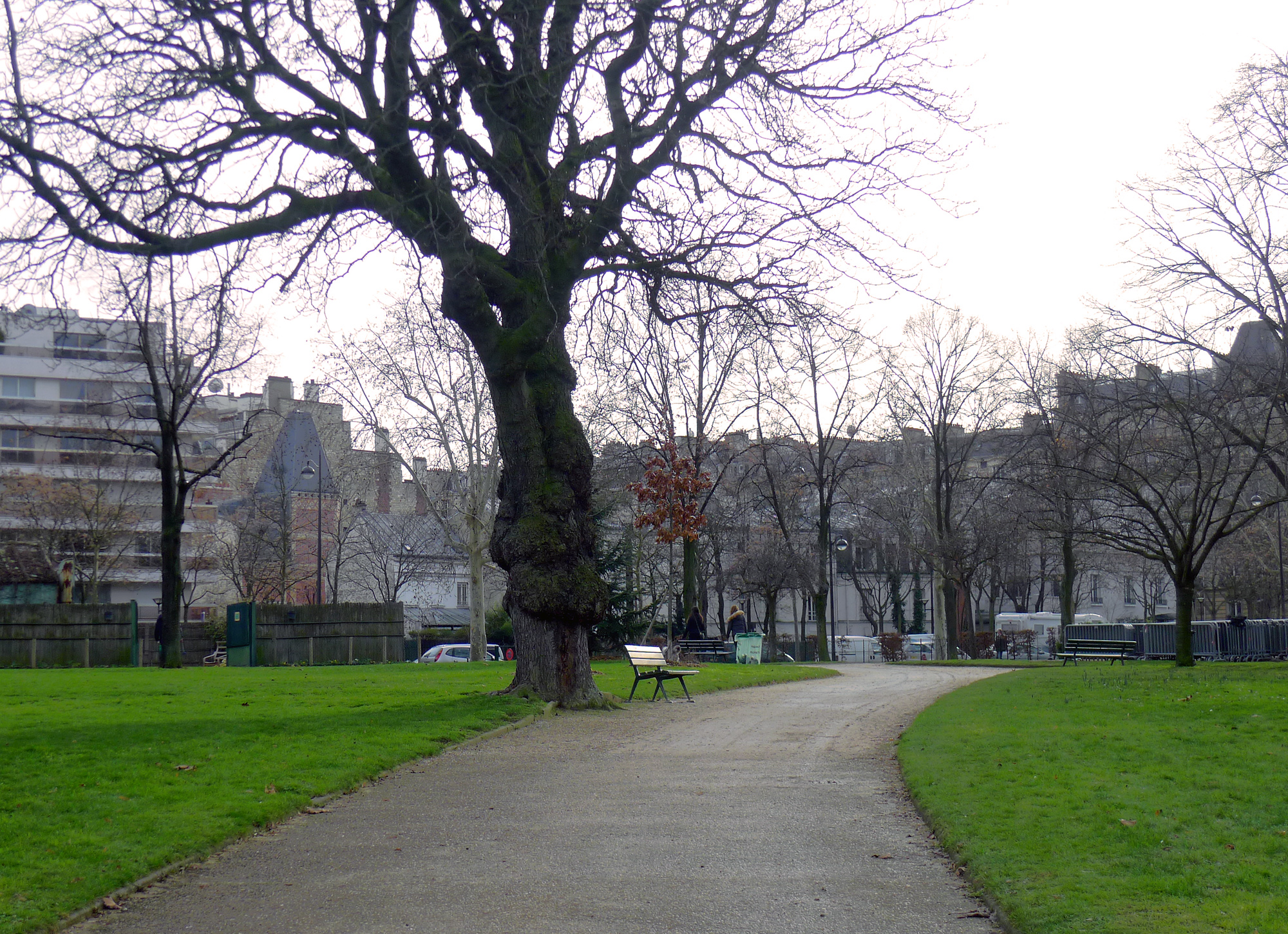 Square Alexandre-et-René-Parodi - Paris XVI